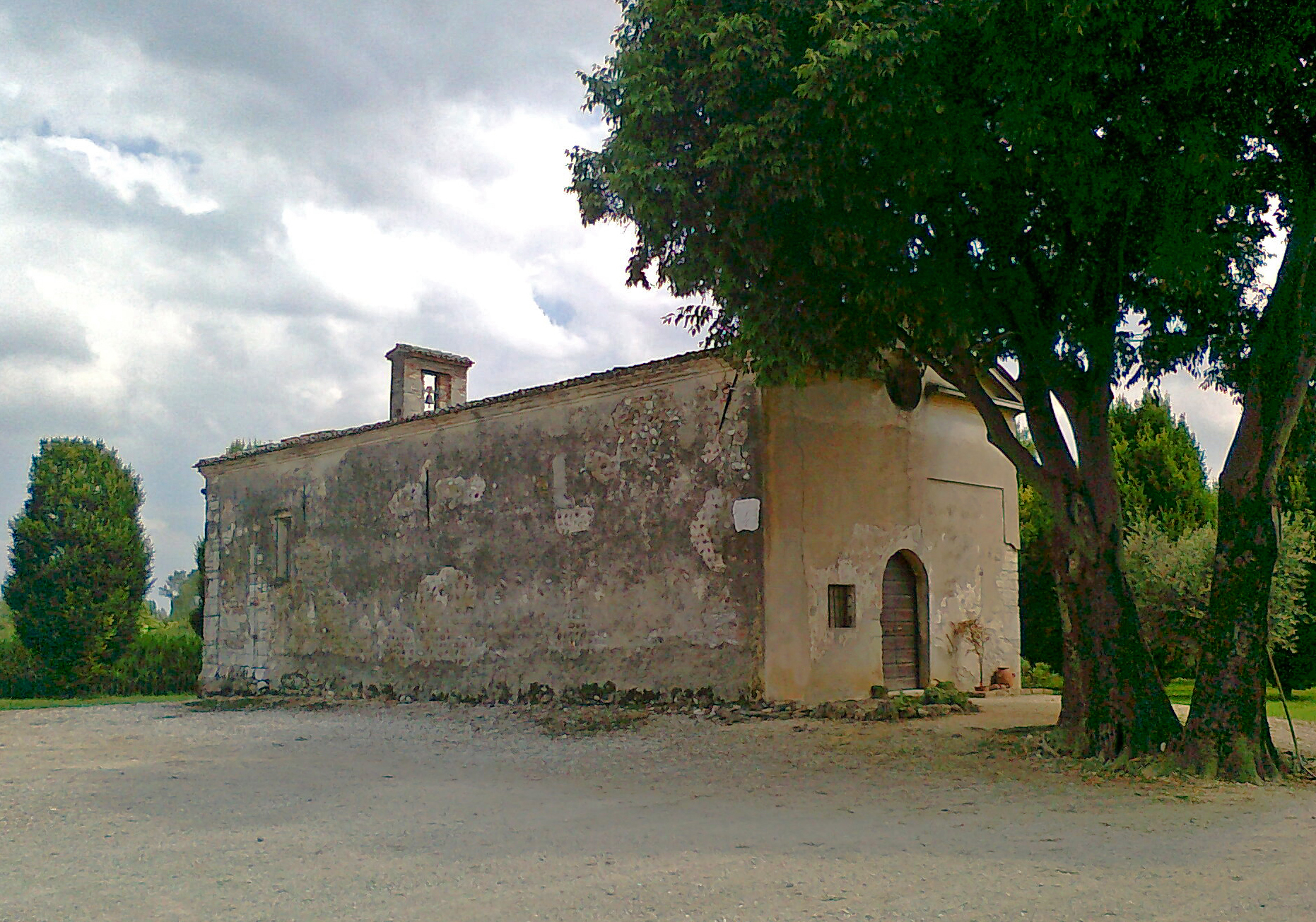 Carpenedolo, la Pieve.